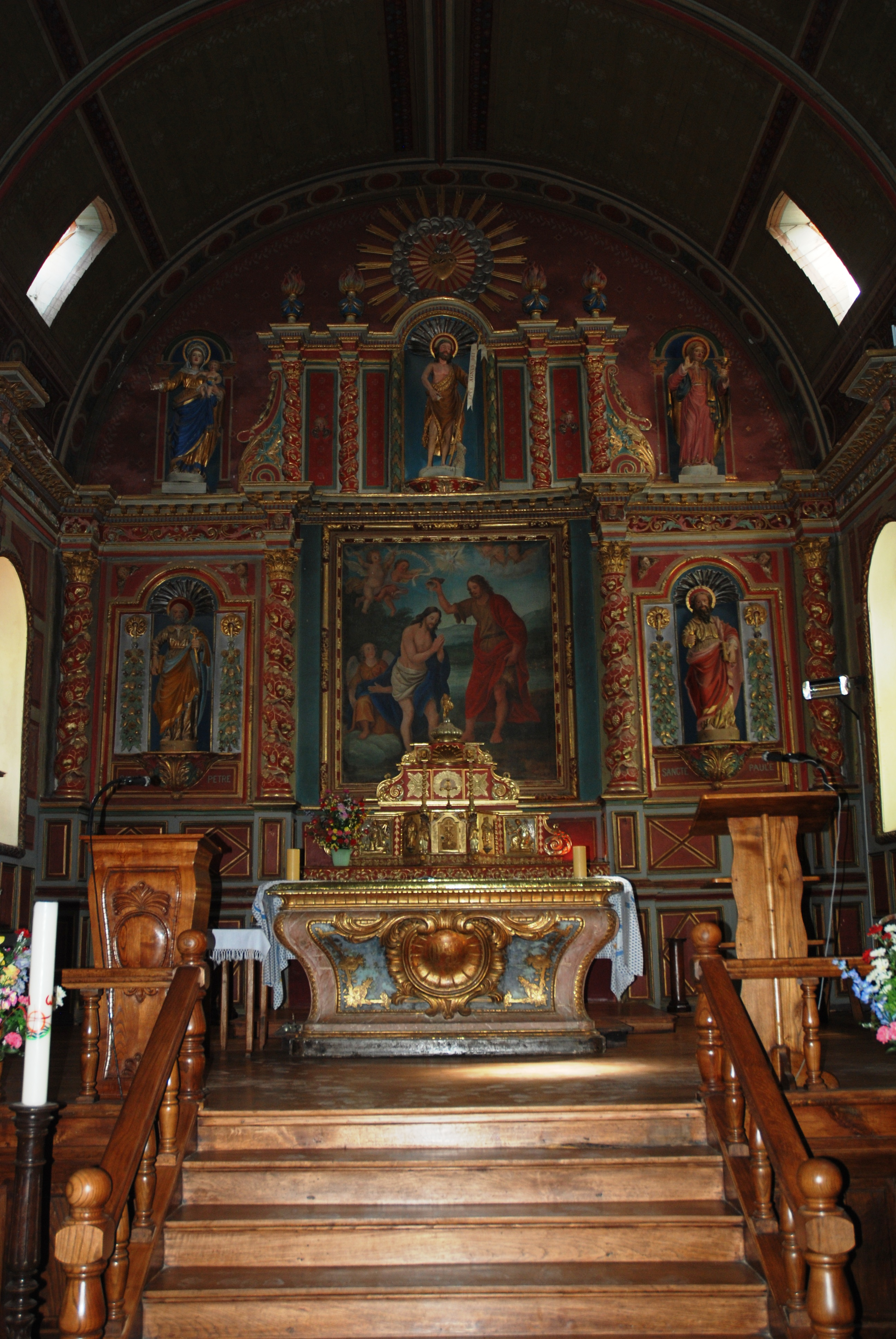 Orègue, l'église Saint-Jean-Baptiste